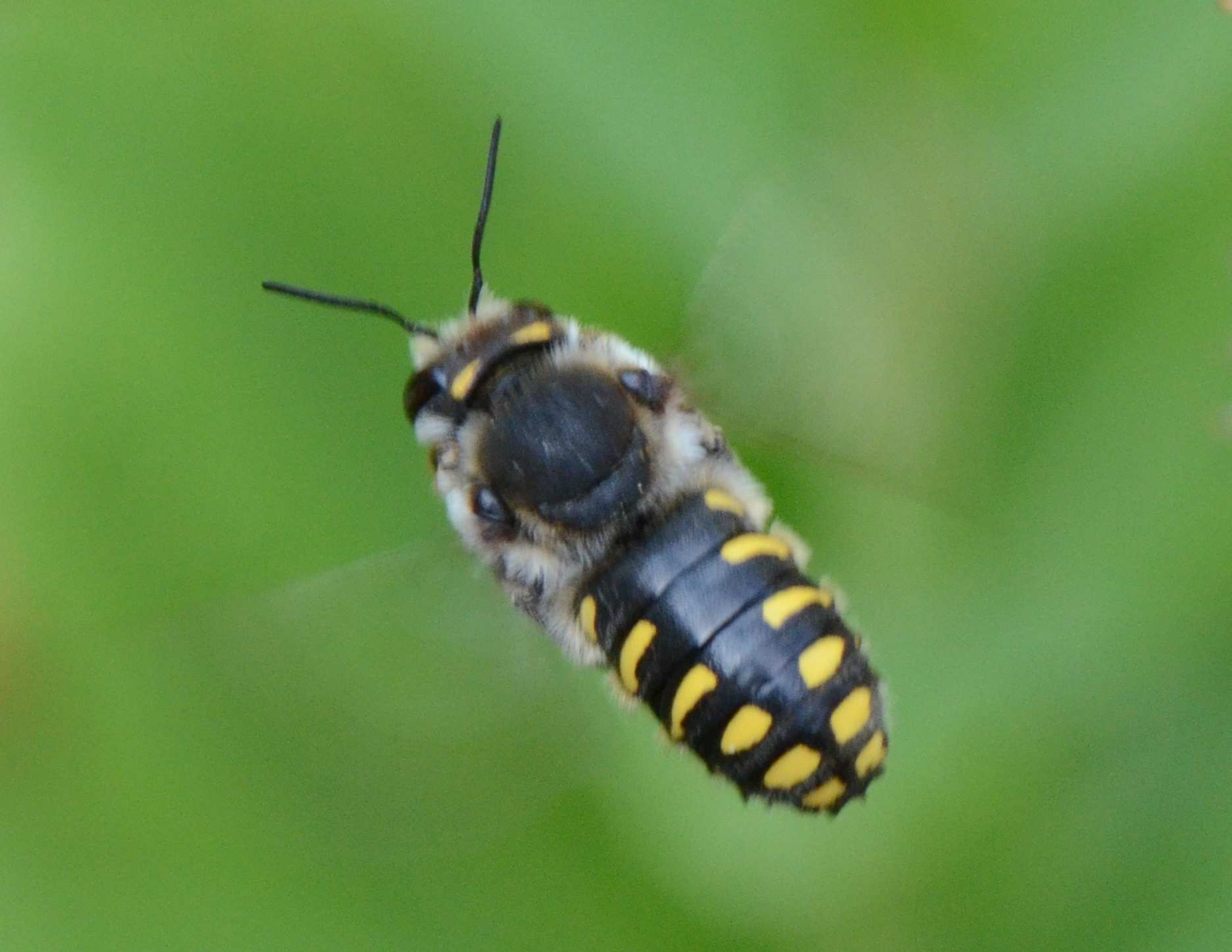 Anthidium manicatum en vol stationnaire, Charente (France)